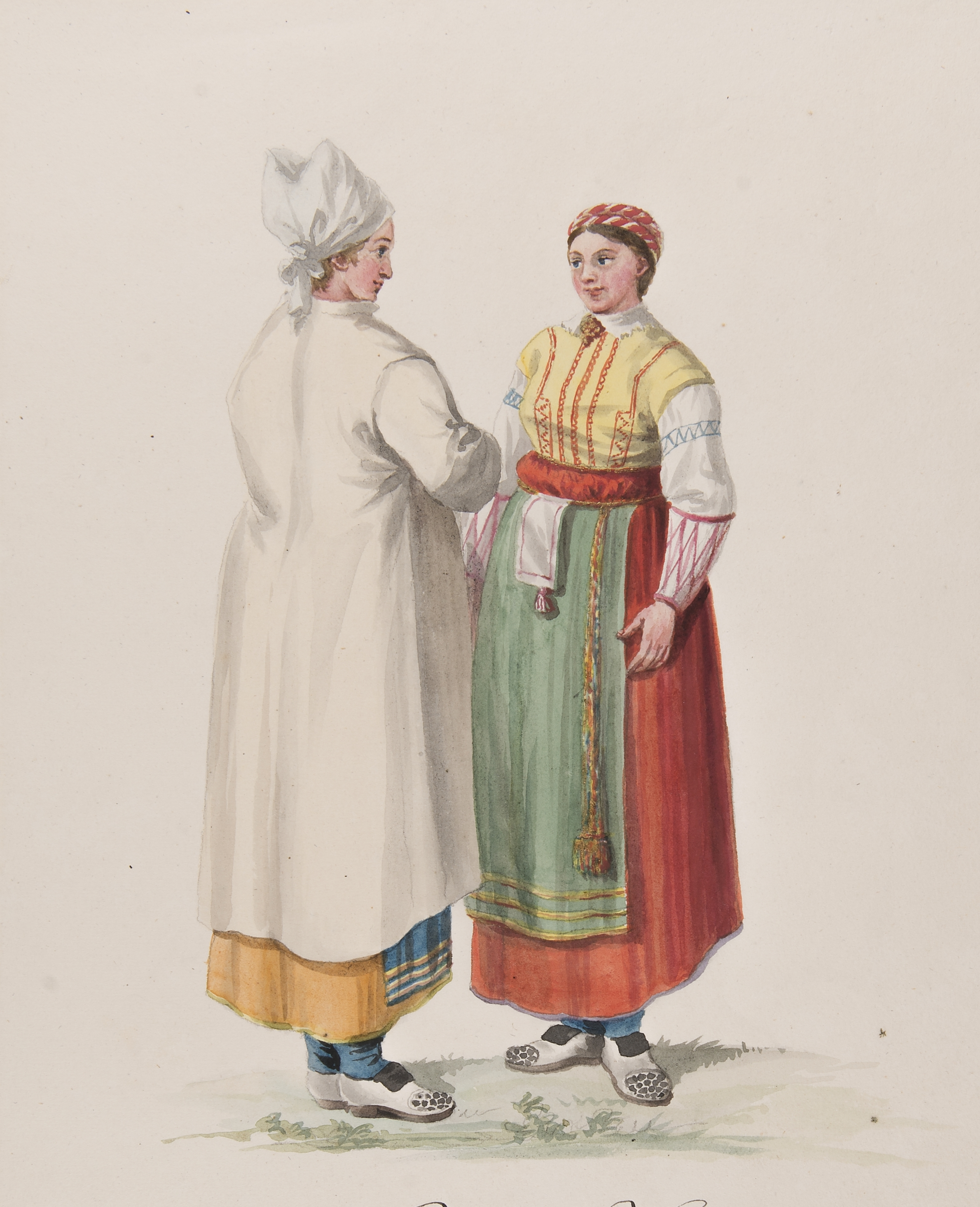 Dräkt. "Femmes de la Paroisse de Wingåker" Två kvinnor i dräkt. Akvarell i storformat av C.W. Swedman. Depicted place: Q10610926 (Q10610926) (Härad), Vingåker sn (Ortnamn därutöver), Södermanland (Q626062)